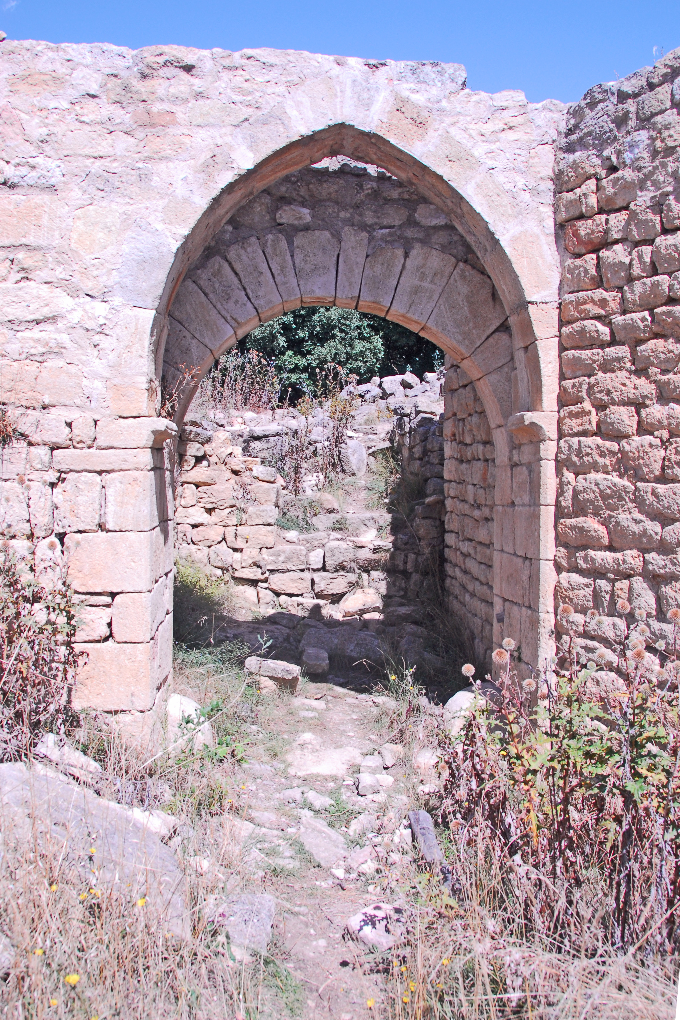 Prieuré de Ganagobie, Villevieille, Stadttor